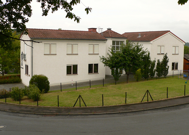 Villip, Villiper Hauptstraße 3, Gebäude Deutscher Imkerbund